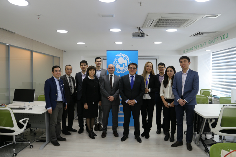 Фотография с открытия лаборатории Unicef, специально для статьи МУИТ